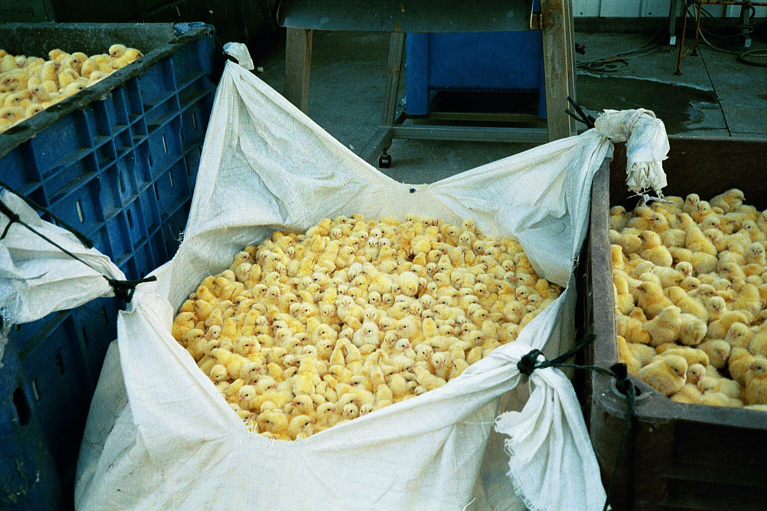 האפרוחים הזכרים לא נחוצים לתעשייה, משום שלא יגדלו מהר כמו אפרוחים מגזעים לבשר ומשום שלא יטילו ביצים. לכן הם מושמדים בשיטות הזולות והאכזריות ביותר